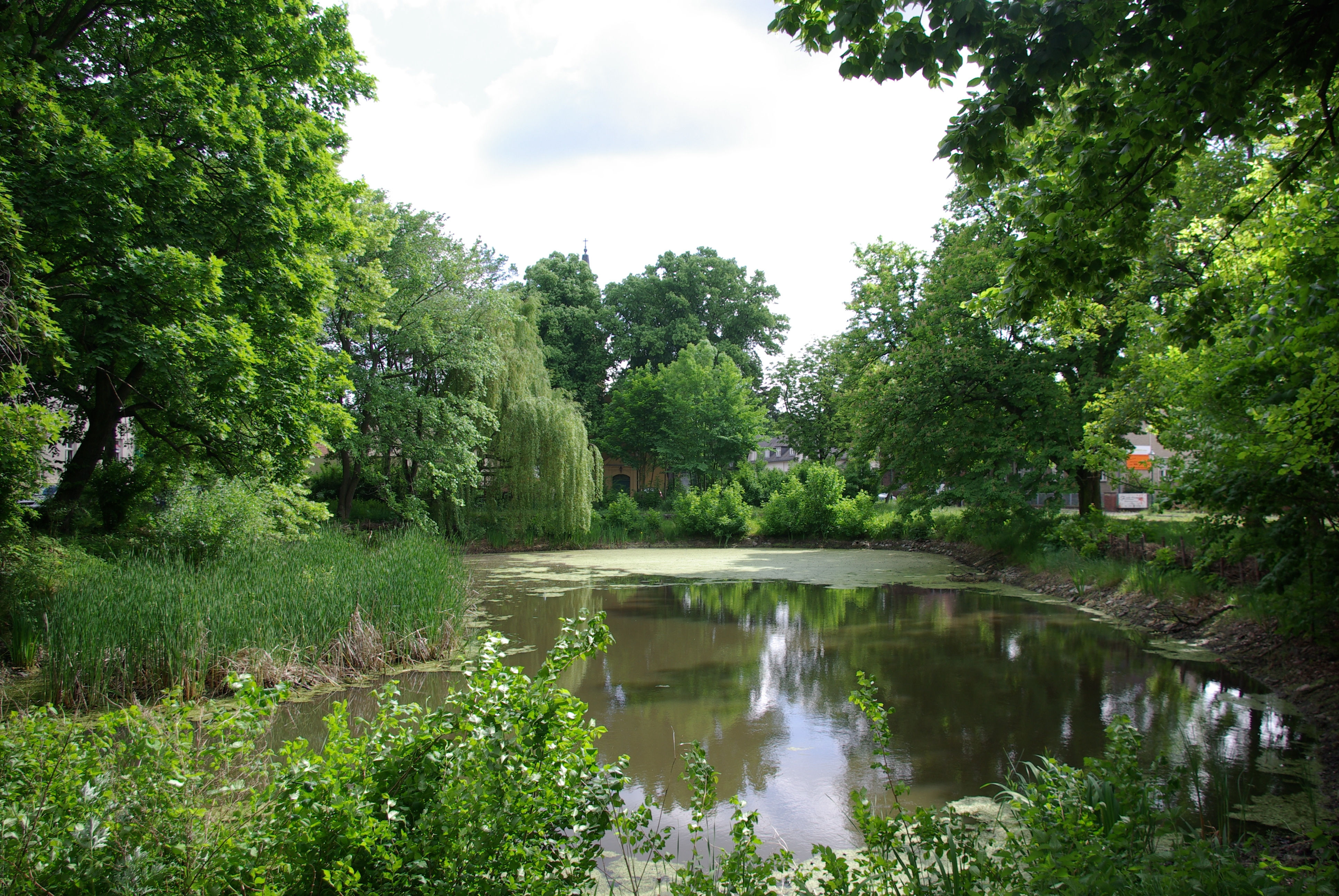 Bohnsdorf in Berlin. In Mitten des Dorfangers befindet sich der Dorfteich. Der Dorfanger ist denkmalgeschützt.